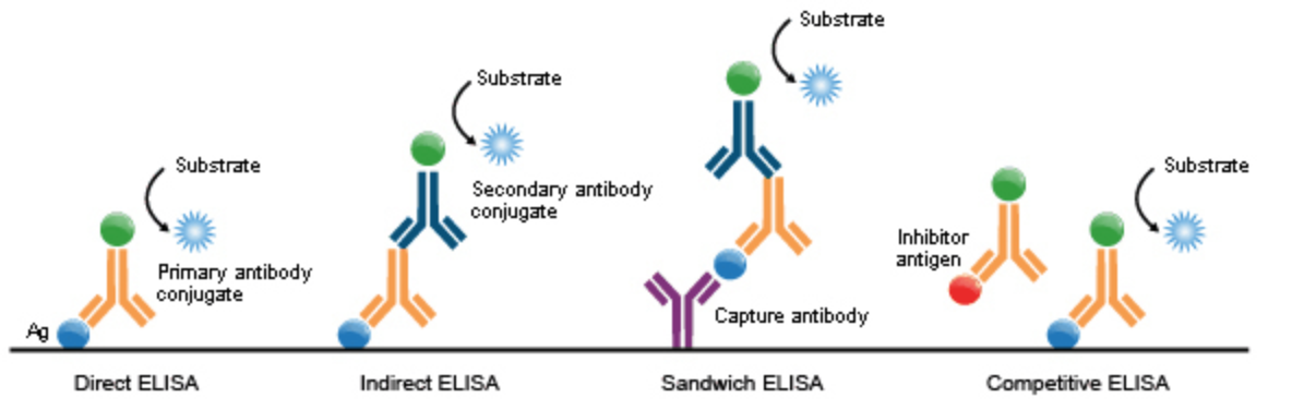 Different types/technics of ELISA